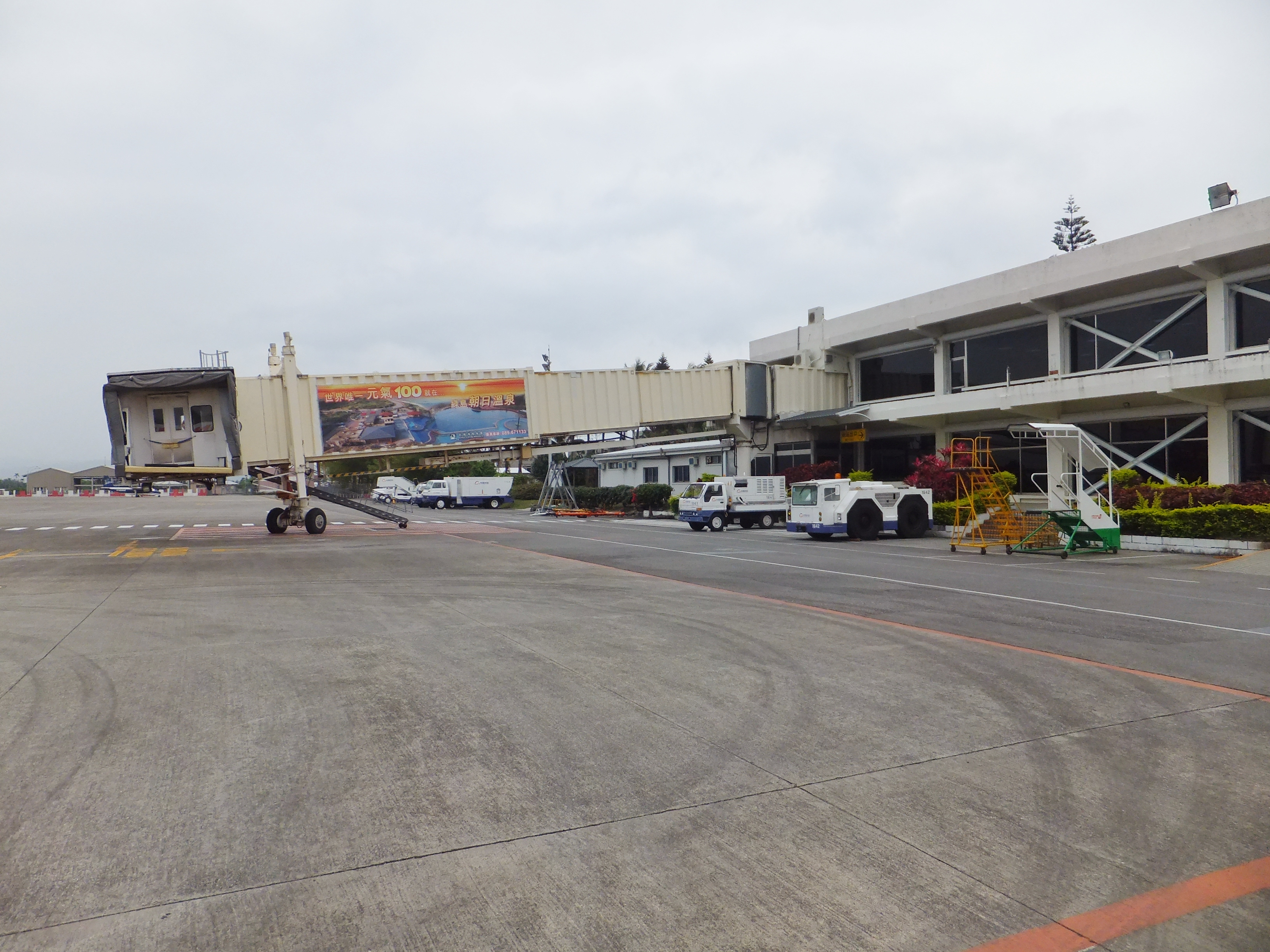 臺東機場的空橋與地勤車輛。